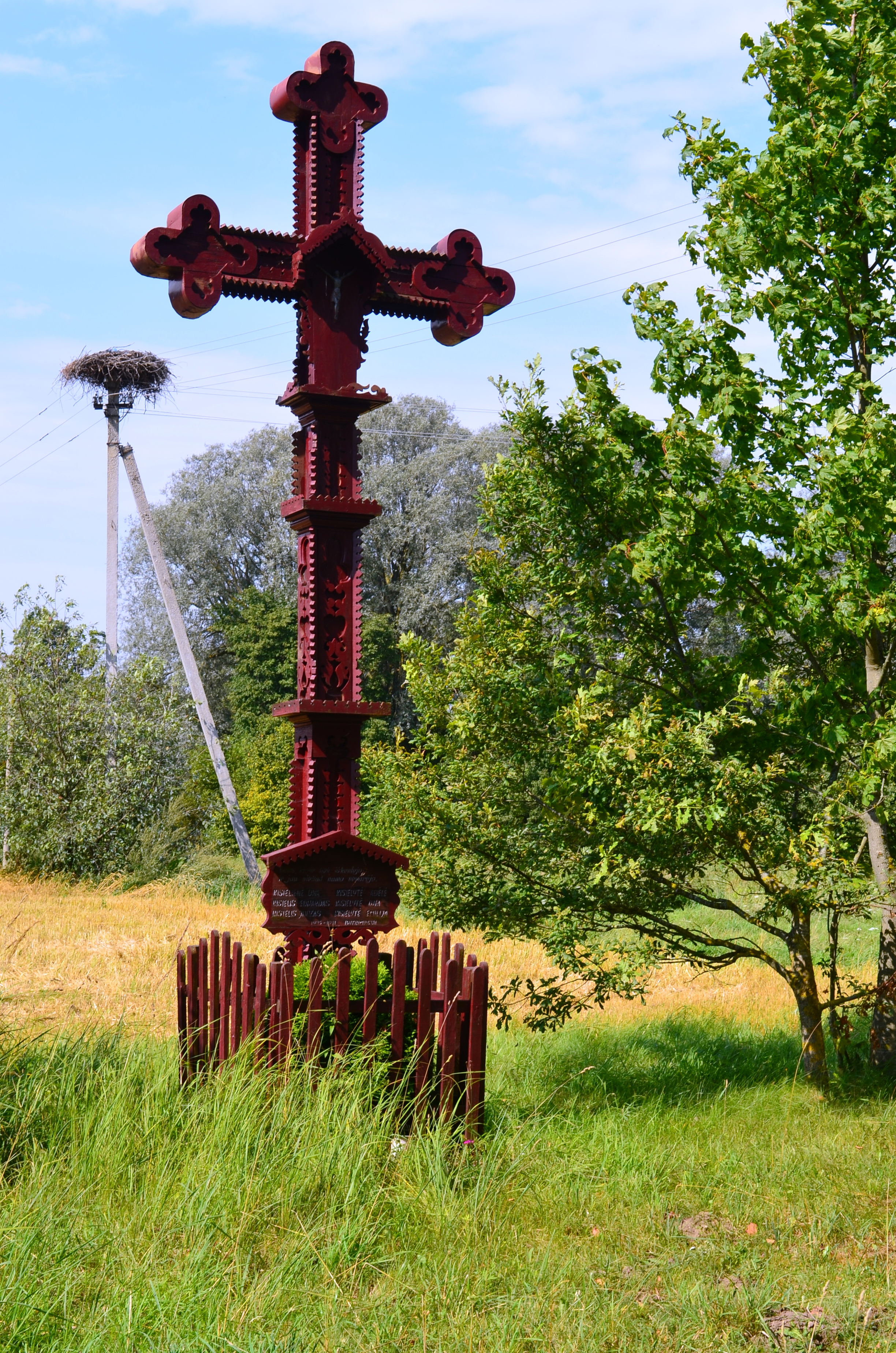 Kryžius tremtiniams, Butrimoniai, Panevėžio r.